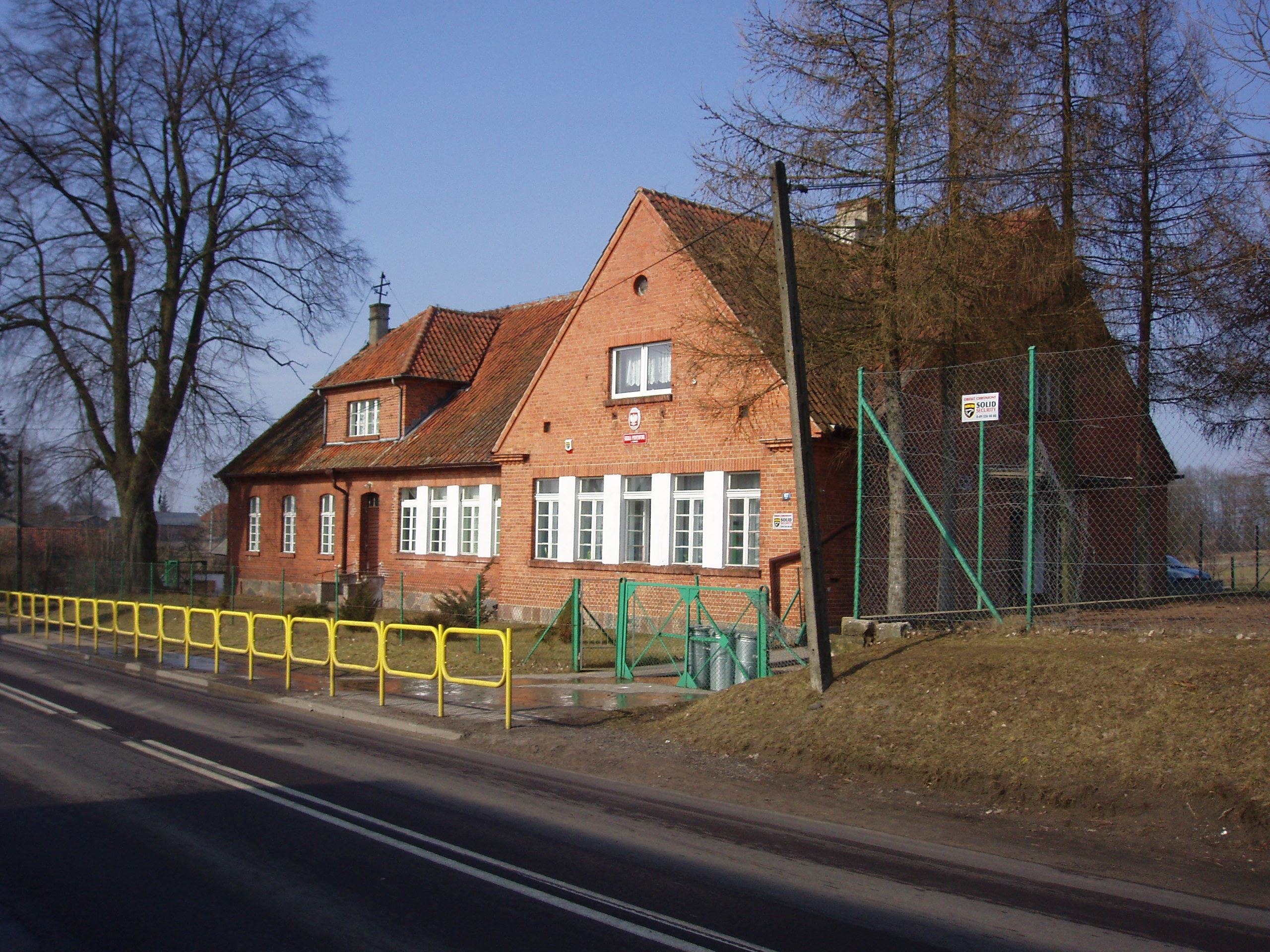 szkoła we wsi Grom, gmina Pasym, budynek historyczny z czerwonej cegły